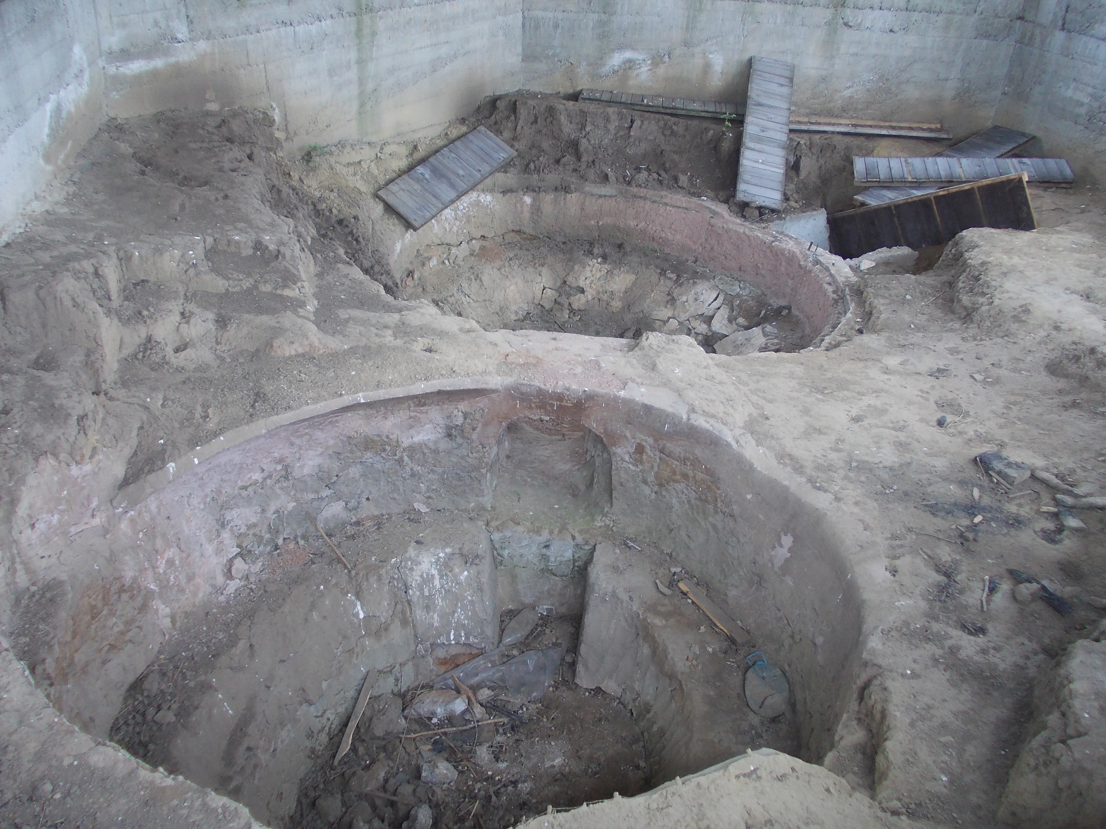 Situl arheologic de la Săbăoani, punct „La Bisericuță”, cuptoare de ars piatra de var, secolul XIV